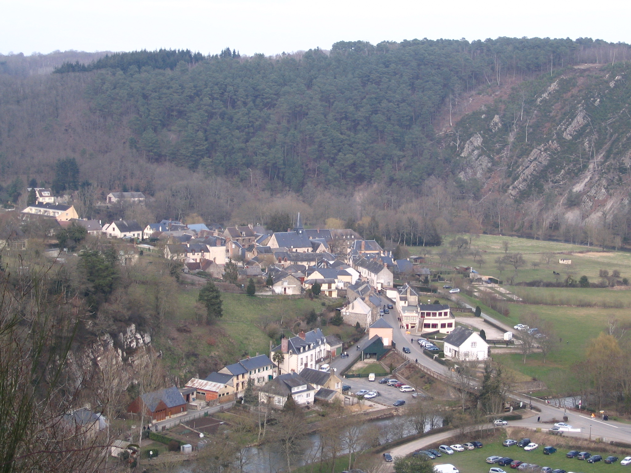 Vue sur le centre de la commune de Saint-Léonard-des-Bois( sarthe, France)